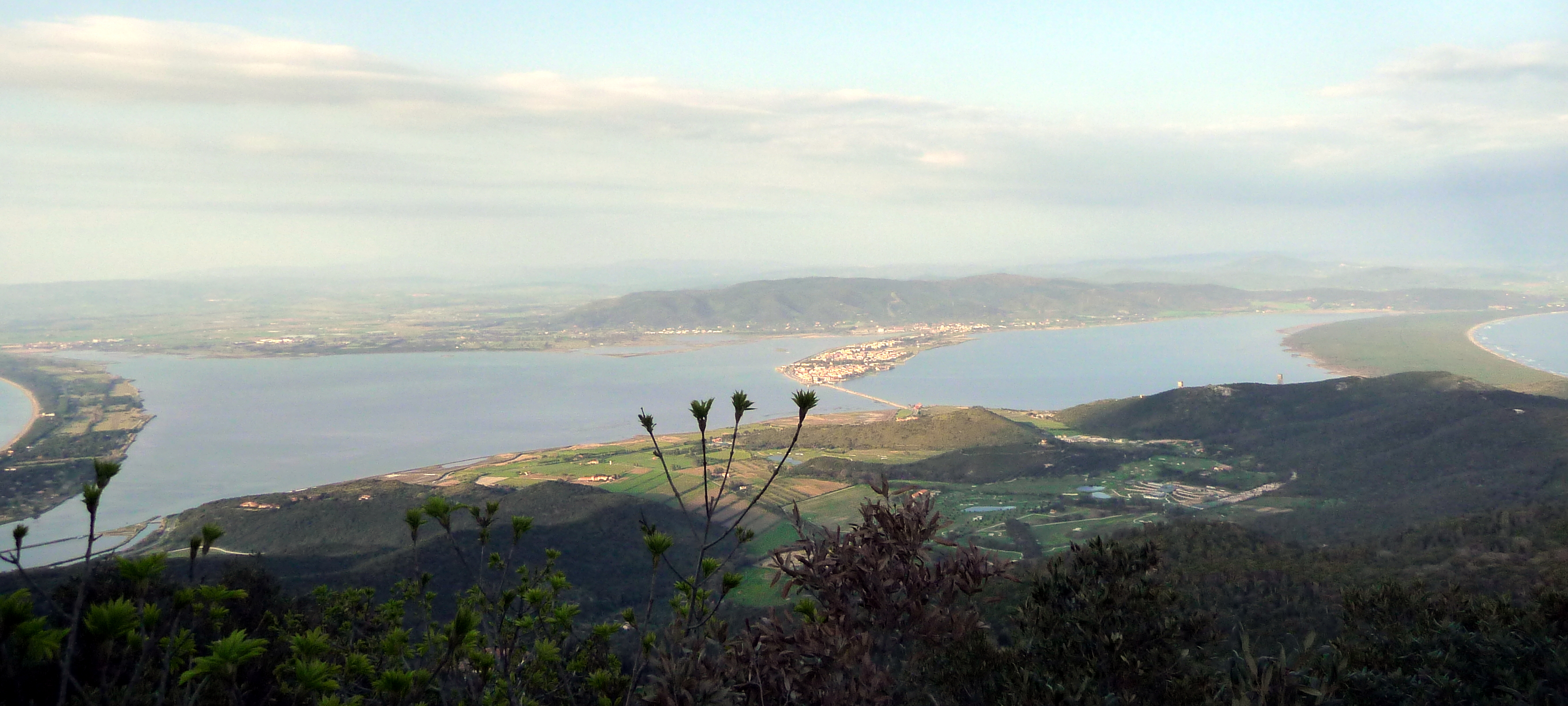 Bellissimo panorama dell'intera laguna di Orbetello vista dalla croce dell'Argentario. A sinistra il tombolo di Giannella, al centro della laguna la città di Orbetello, a destra il tombolo della Feniglia. In primo piano in basso a destra il Golf Club Argentario Resort ed il campo di Polo.